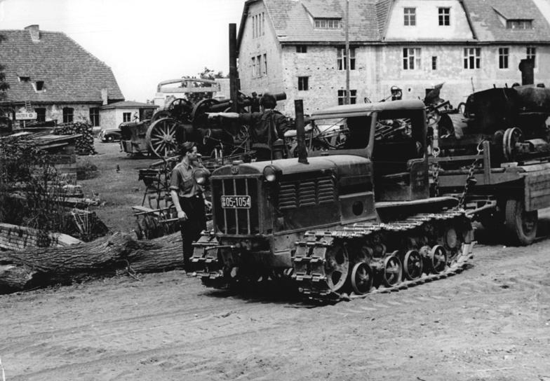 Sachsendorf, Maschinenpark der MAS ADN-ZB Blunck 1950 MAS Sachsendorf Bezirk Frankfurt-Oder. Der Maschinenpark. [u.a. Traktor] Aufn. 1950.